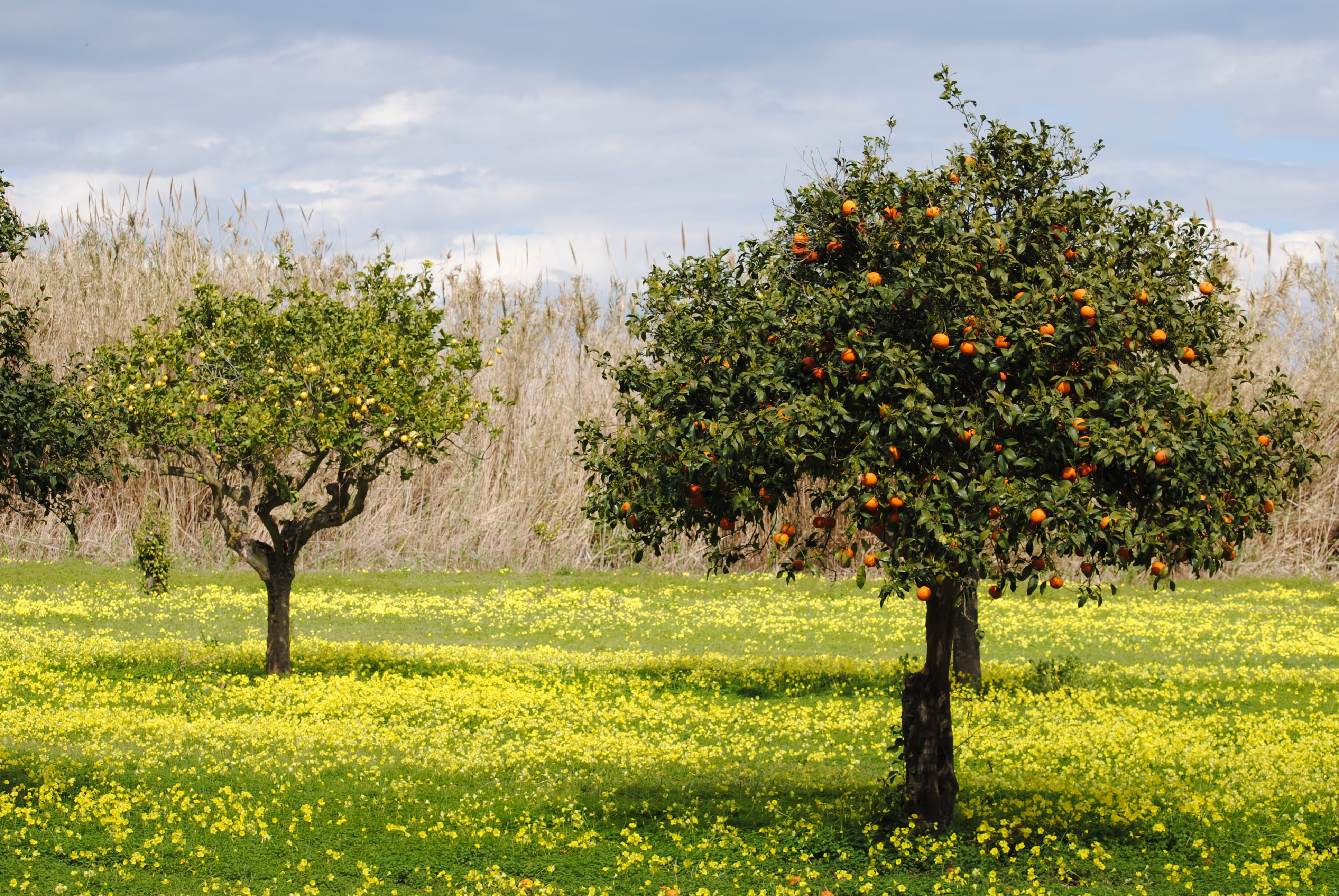 Prato fiorito con alberi di agrumi. Riserva Naturale di Vendicari - Sicilia, Italia